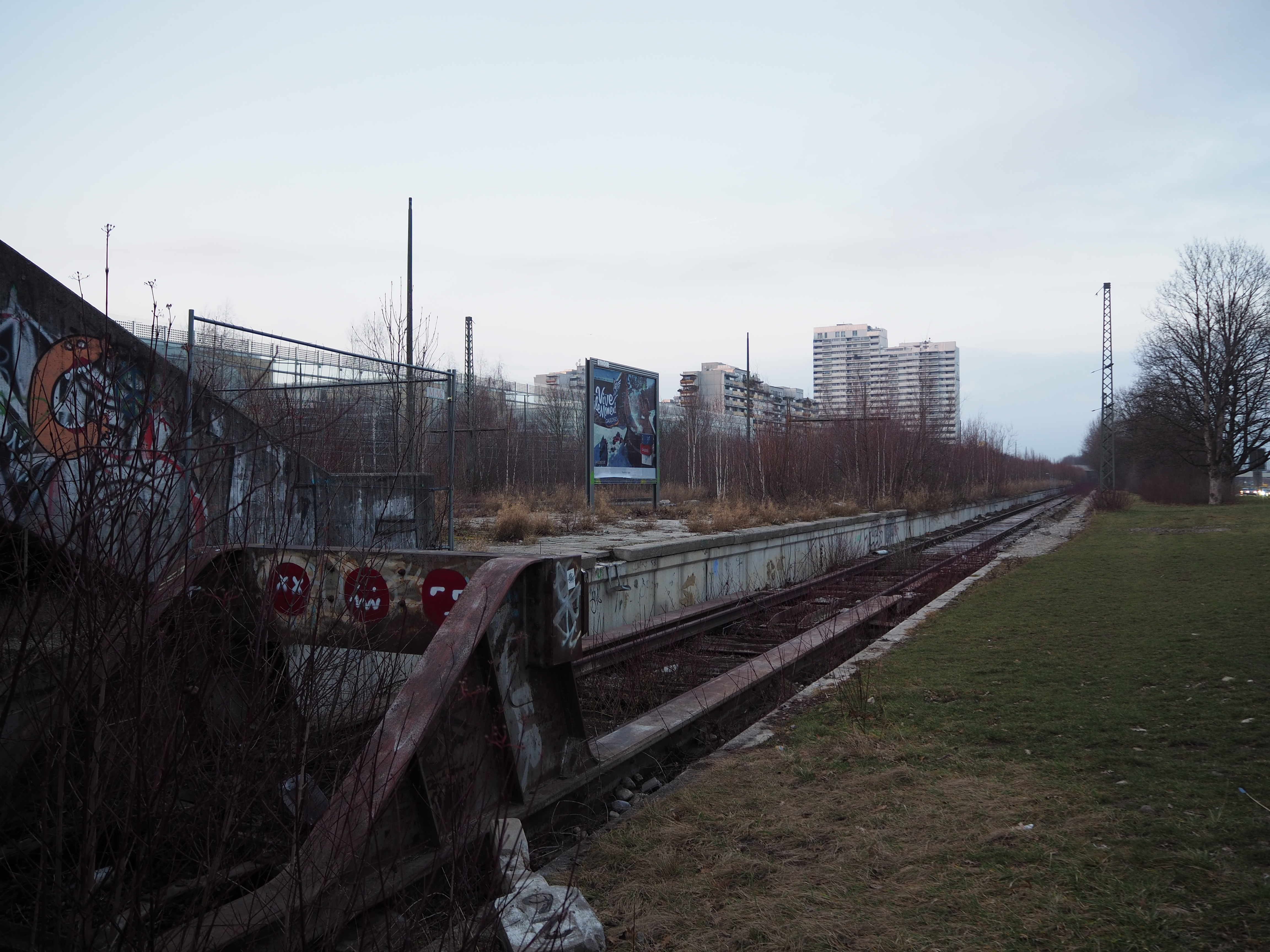 Gleisanlage des Münchener S-Bahnhofes Olympiastadion